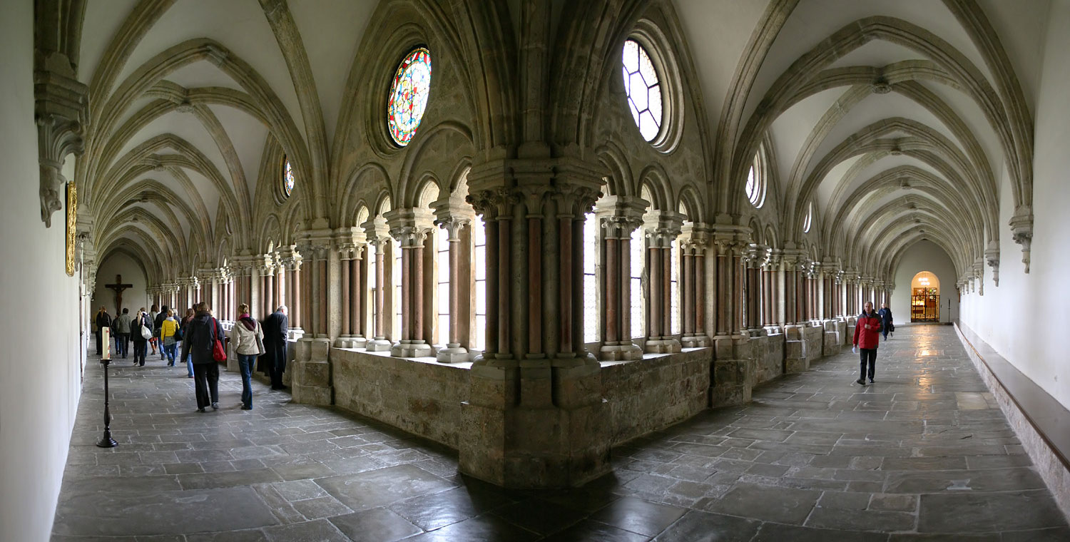 Stift Lilienfeld, Kreuzgang